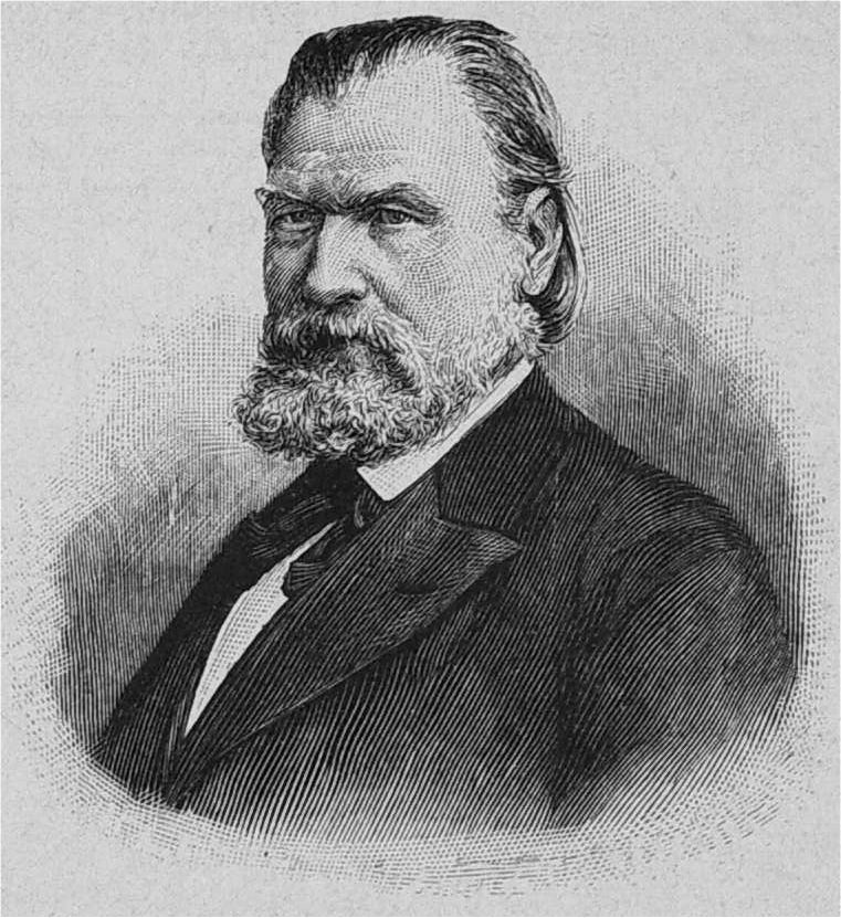 Portrait of August Essenwein (1831-1892)